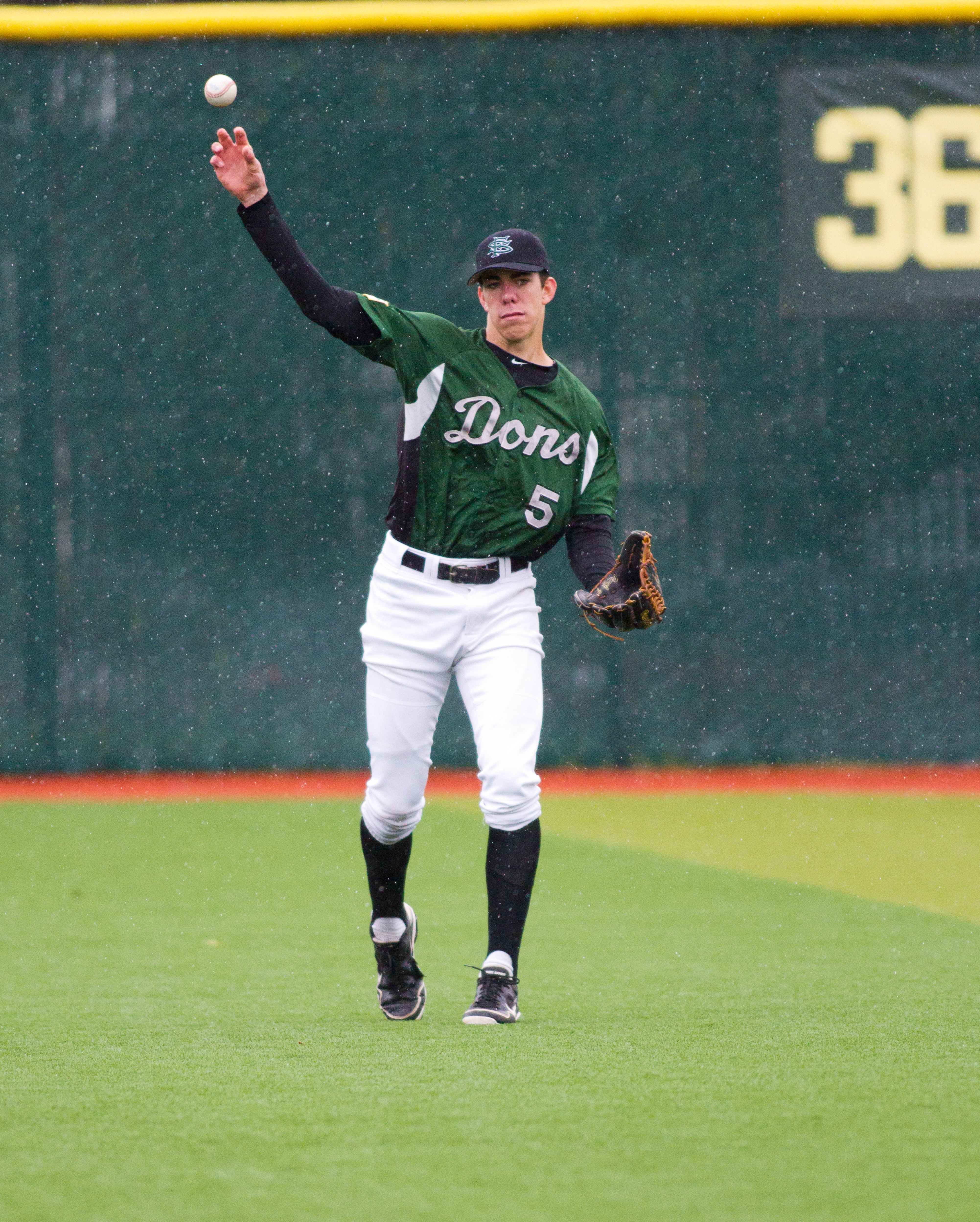 Bradley Zimmer (5)